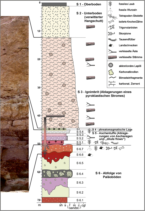 Detailliertes Schichtenprofil der Ausgrabungsstätte im Zeisigwald-Tuff in der Frankenberger Straße in Chemnitz mit Verzeichnung der Fossilfundhorizonte. An der Basis der Abfolge (S 6) finden sich Paläoböden (oder ein in Horizonte differenzierter Paläoboden?) mit Baumwurzeln in Lebendstellung. Die sich in der Ablagerungssequenz nach oben anschließenden Schichten (S 5–3) repräsentieren den explosiven Vulkanismus des Zeisigwald-Vulkans (z.B. Ablagerungen von Ascheregen und pyroklastischen Strömen), der wahrscheinlich die Überlieferung der bemerkenswerten lokalen unterpermischen Lebewelt erst ermöglichte. (Anmerkung zur Beschriftung von Schicht S 5: „dilute flows”, auch „surges“ genannt, sind ein mit pyroklastischen Strömen assoziiertes Phänomen, bei dem sehr feinkörnige Pyroklastika in einem sehr gasreichen Strom suspendiert reisen.) Die Schichten S 2 und S 1 sind quartäre Ablagerungen und Bodenbildungen. Bedeutung der Abkürzungen am Fuß der Profilgrafik (Korngrößenskale): sh = Tonstein (engl. shale), s = Silt/Schluff, f = Feinsand, m = Mittelsand, c = Grobsand (engl. coarse sand), cgl = Konglomerat (engl. conglomerate).